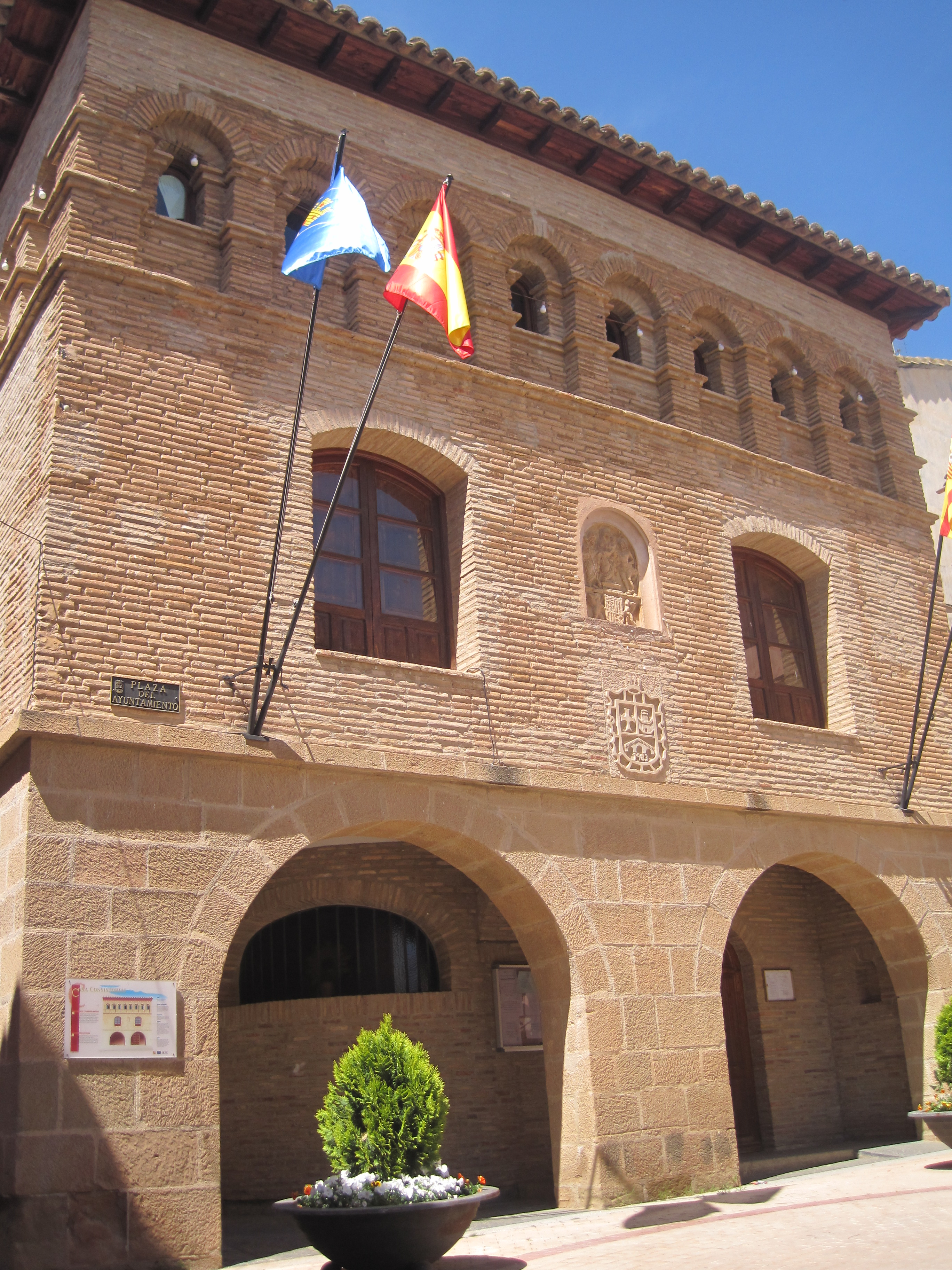 Aragonés: Casa d'a villa de Castillón d'o Puent, Semontano de Balbastro, Aragón.